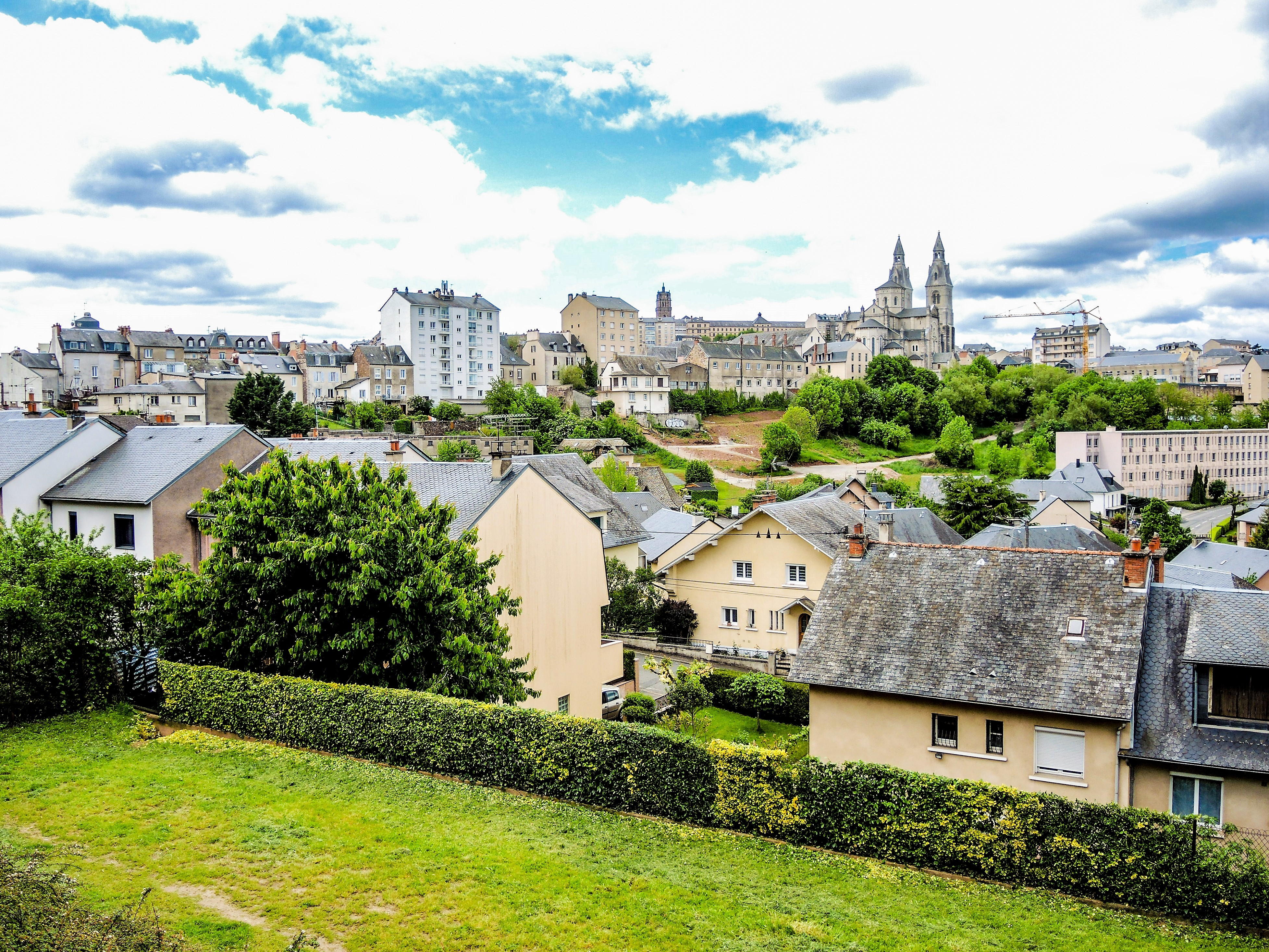 Panorama